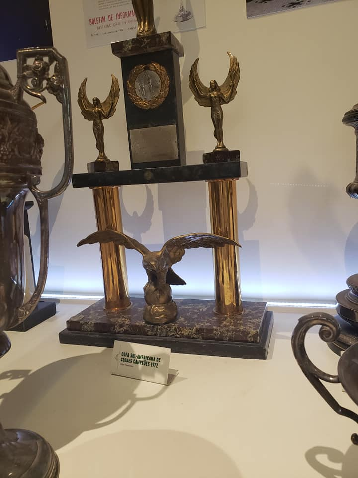 Troféu da Copa Sul-Americana de Clubes Campeões de 1972 conquistada pelo Fluminense Football Club.